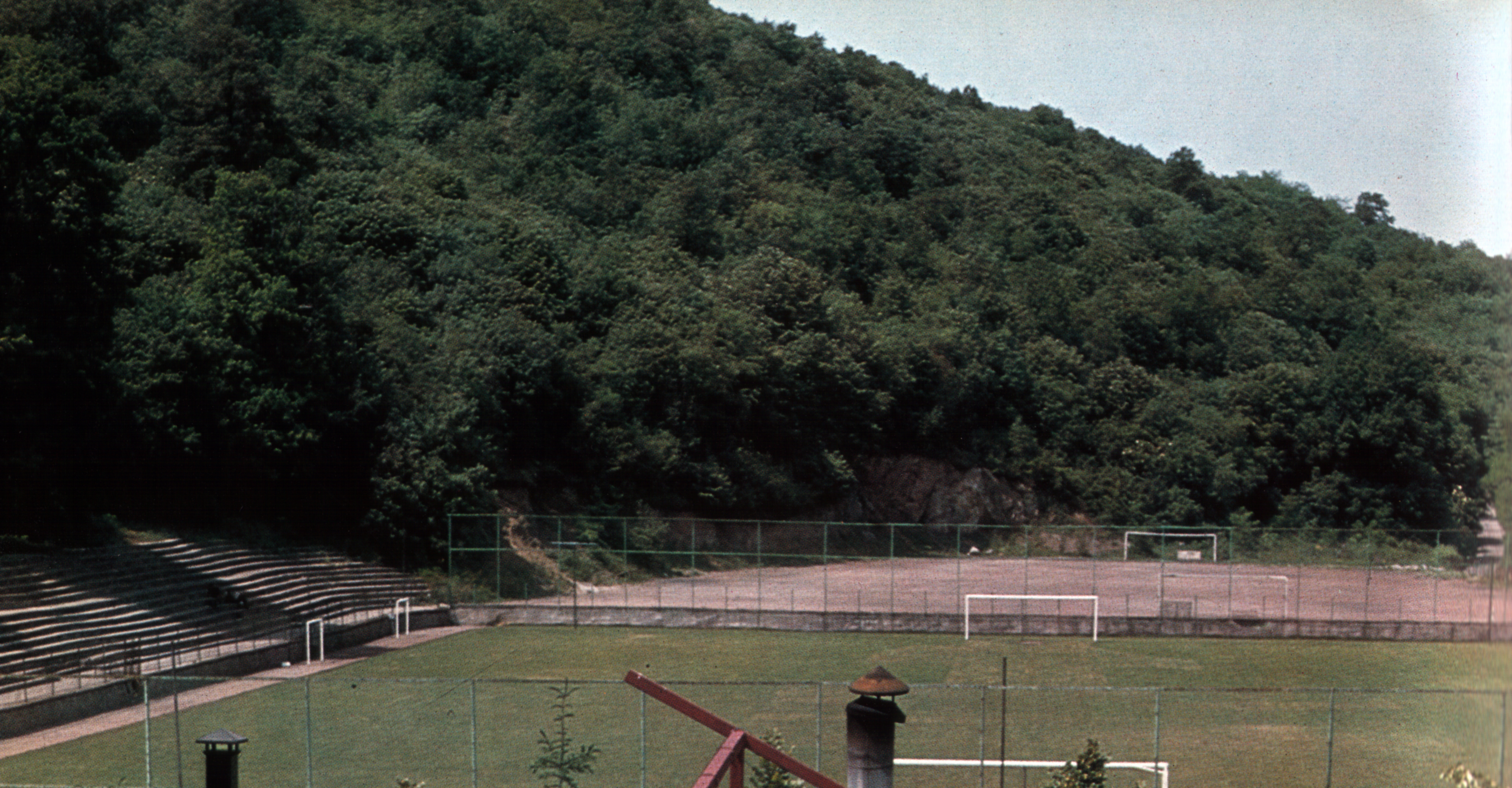 Српски (ћирилица): Фудбалски стадион ИМ Раковице, подно кошутњачке шуме